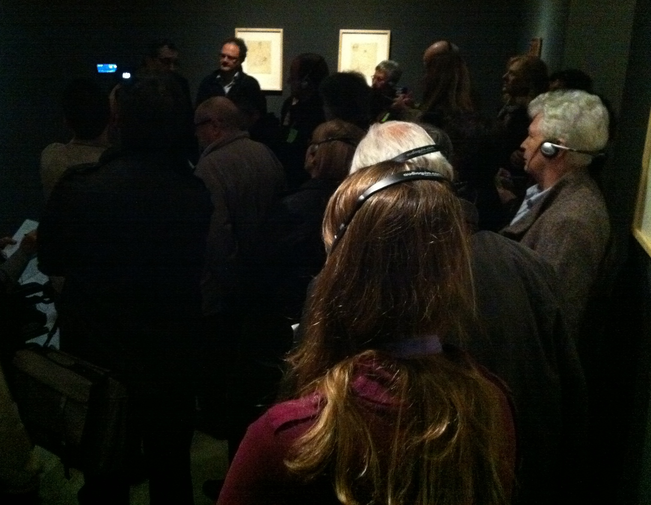 El museu vist per Francesc Fontbona, activitat educativa al Museu Picasso